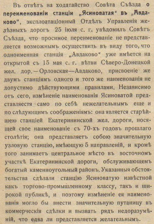 Горно-заводское дело, № 31. 1916. - с. 13971